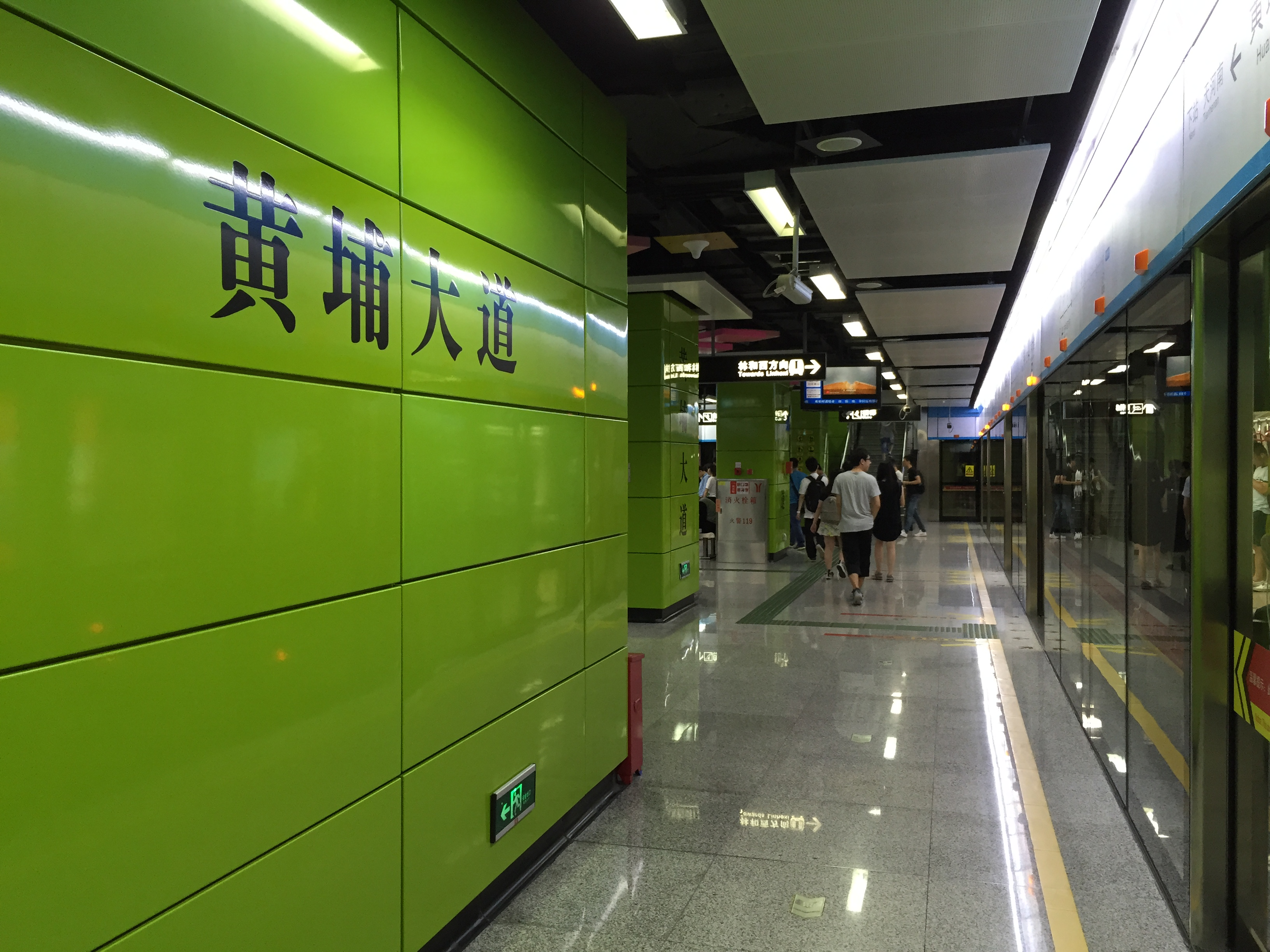 广州地铁黄埔大道站